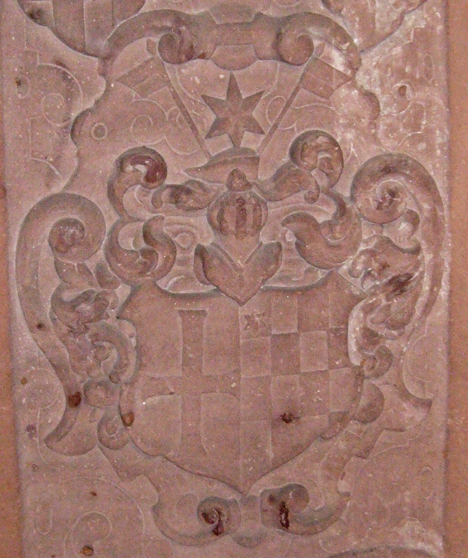 Komturwappen vom Wappenepitaph des Johanniterkomturs (=Malteser) von Hangen-Weisheim, Heinrich Nikolaus Faust von Stromberg (+ 1621), Stadtmuseum Worms